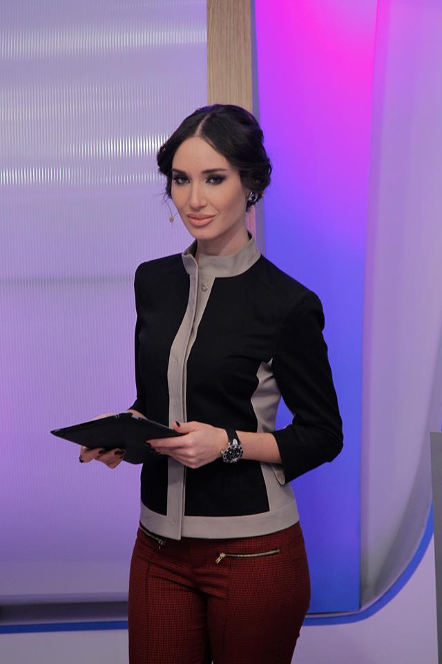 Նազենի Հովհաննիսյանը Մարդկային գործոն հաղորդմանը